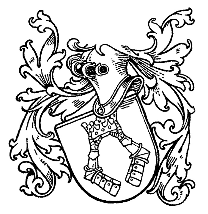 Wappen von Diederikeshausen bzw. Thiderikeshusen bei Büren, Westfalen.